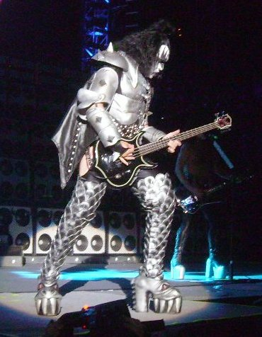 Gene Simmons